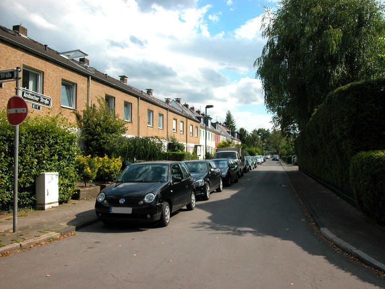 Die Straße "Ansbacher Straße" in Benrath, Düsseldorf